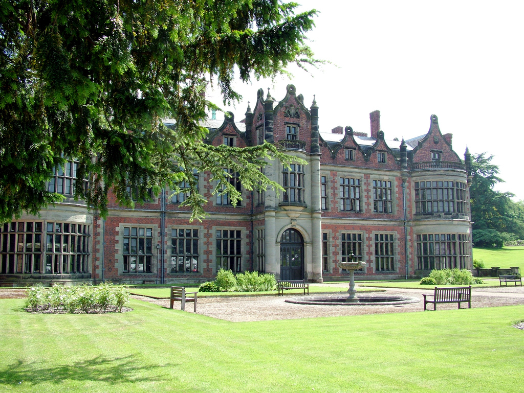 Ingestre Hall .June 2007